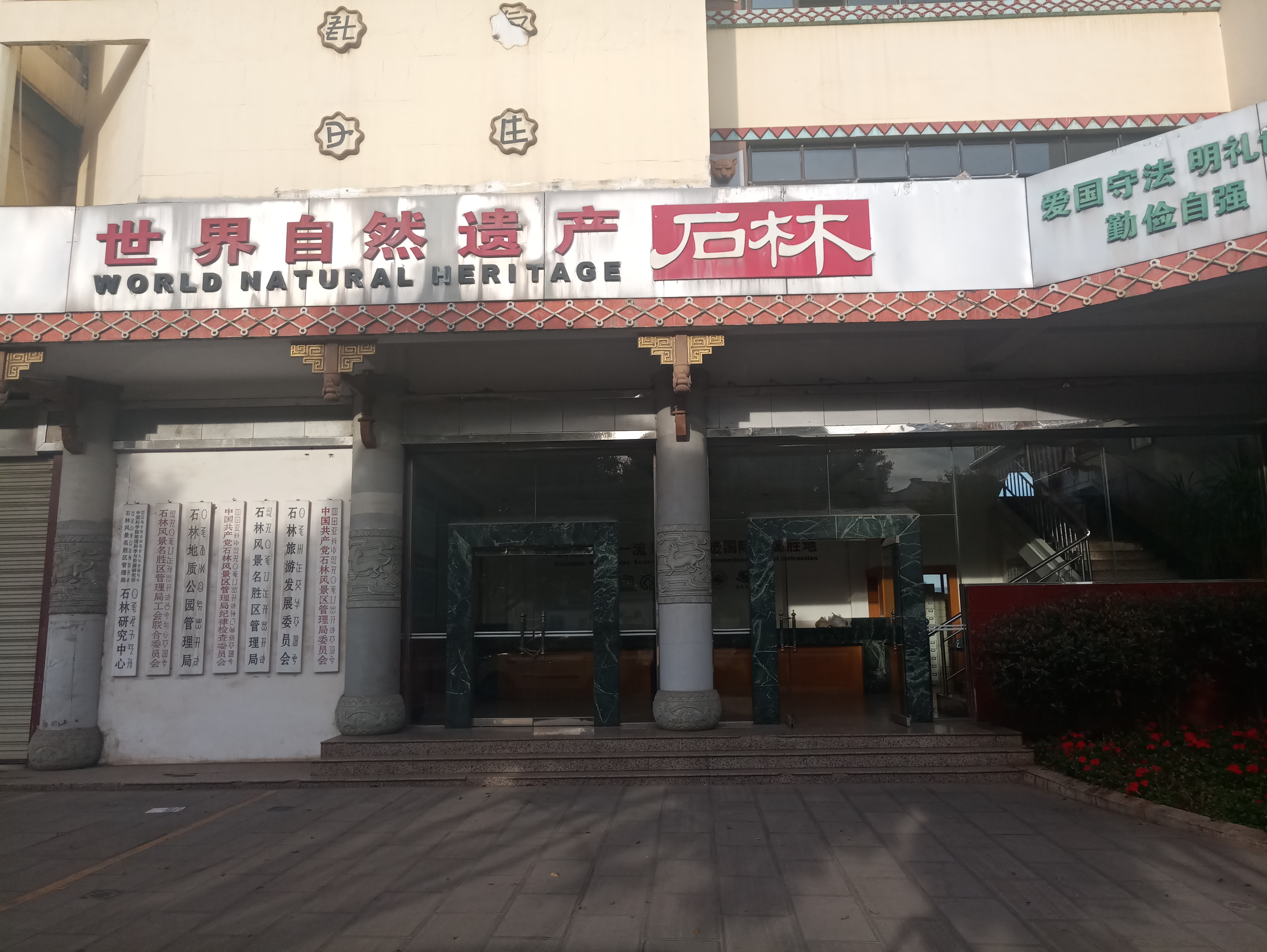 中文（中国大陆）: 石林风景名胜区管理局